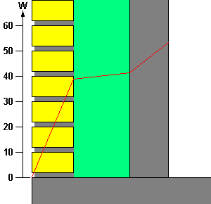 Varmestrøm. En ydermur består af 108 mm teglsten: 0,5 W/m K, 142 mm isolering: 0,03 W/m K og 100 mm letbeton: 0,15 W/m K. Er muren eksempelvis 8 x 2,5 m og temperaturforskellen 15°, så vil varmestrømmen blive 53,4 W. Kurven er lidt søgt i og med at det er reciprokke værdier, der lægges sammen, men giver dog et godt billede af forholdet de tre materialers indbyrdes varmestrømsevne.